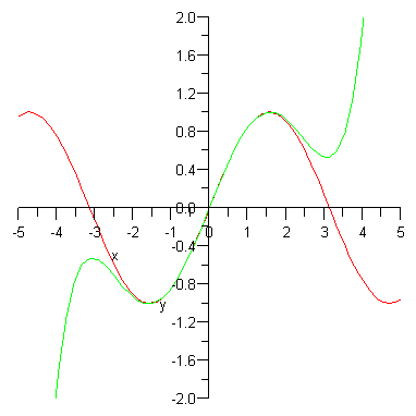 sin(x) og det approksimerende Taylorpolynomium af grad 5, plottet i samme koordinatsystem.